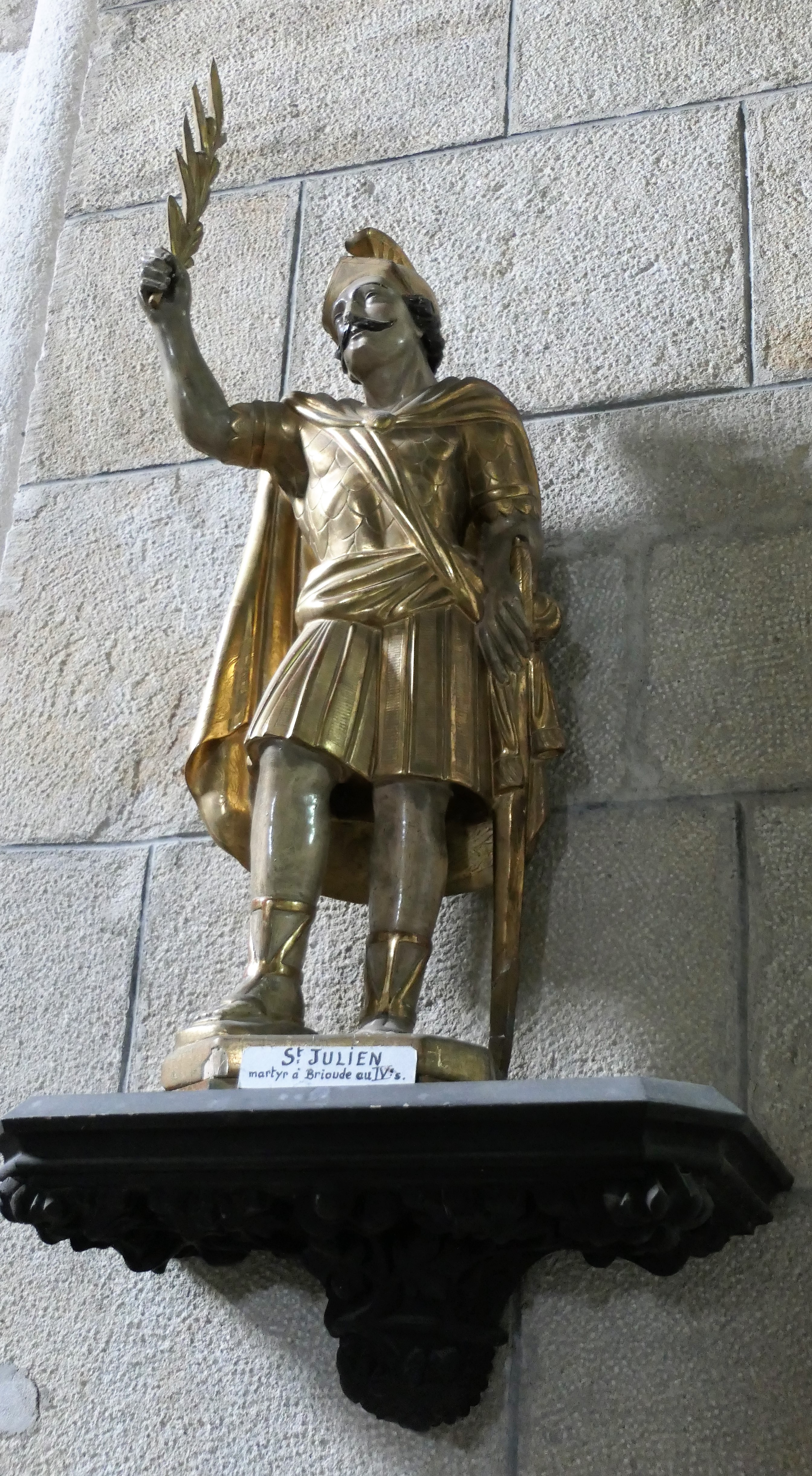 Eglise Saint-Julien de Saint-Julien-Chapteuil, statue de Saint-Julien de Brioude